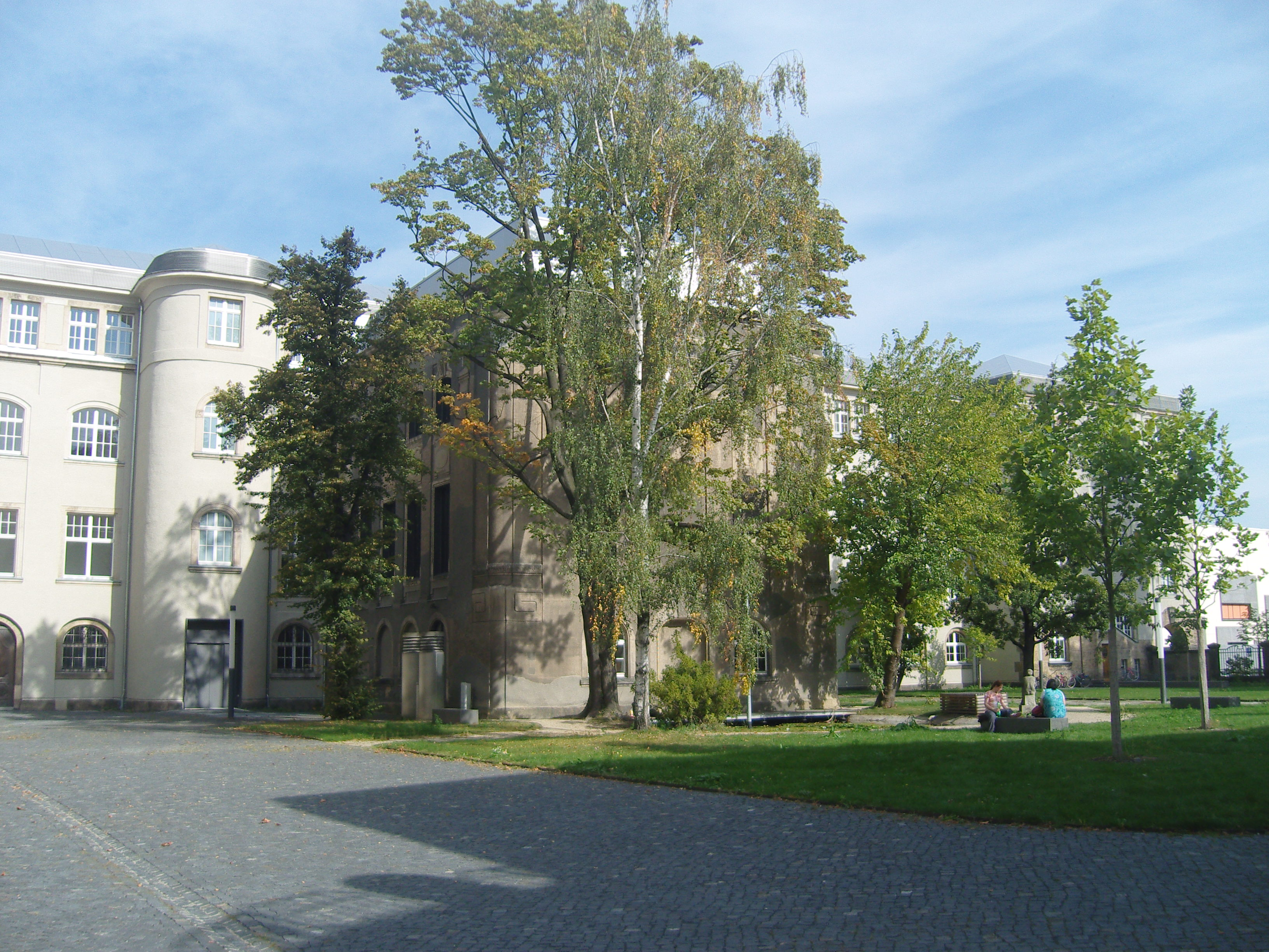 Innenhof der Hochschule für Bildende Künste Dresden; Gebäude Güntzstraße 34